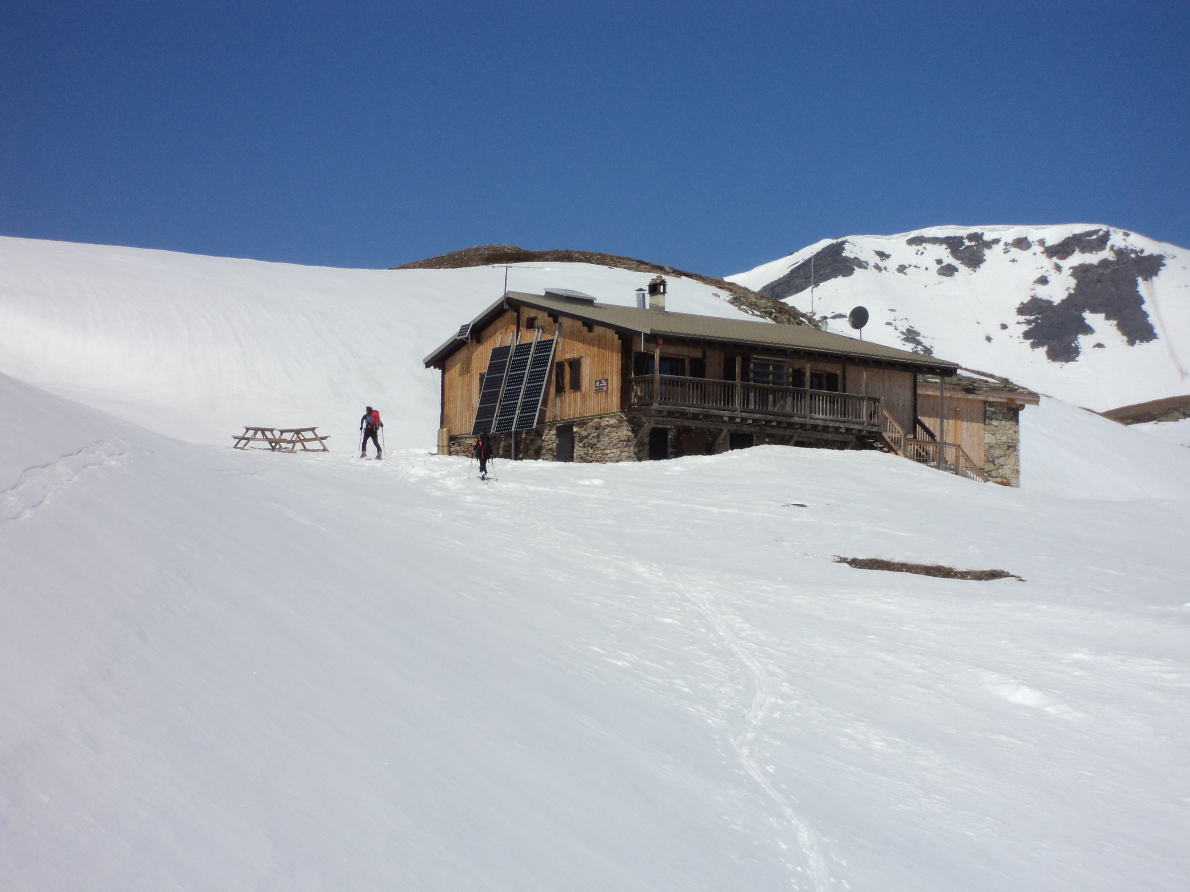 Il Rifugio del Monte Thabor - Alpi Cozie - Alta Moriana - Savoia - Francia